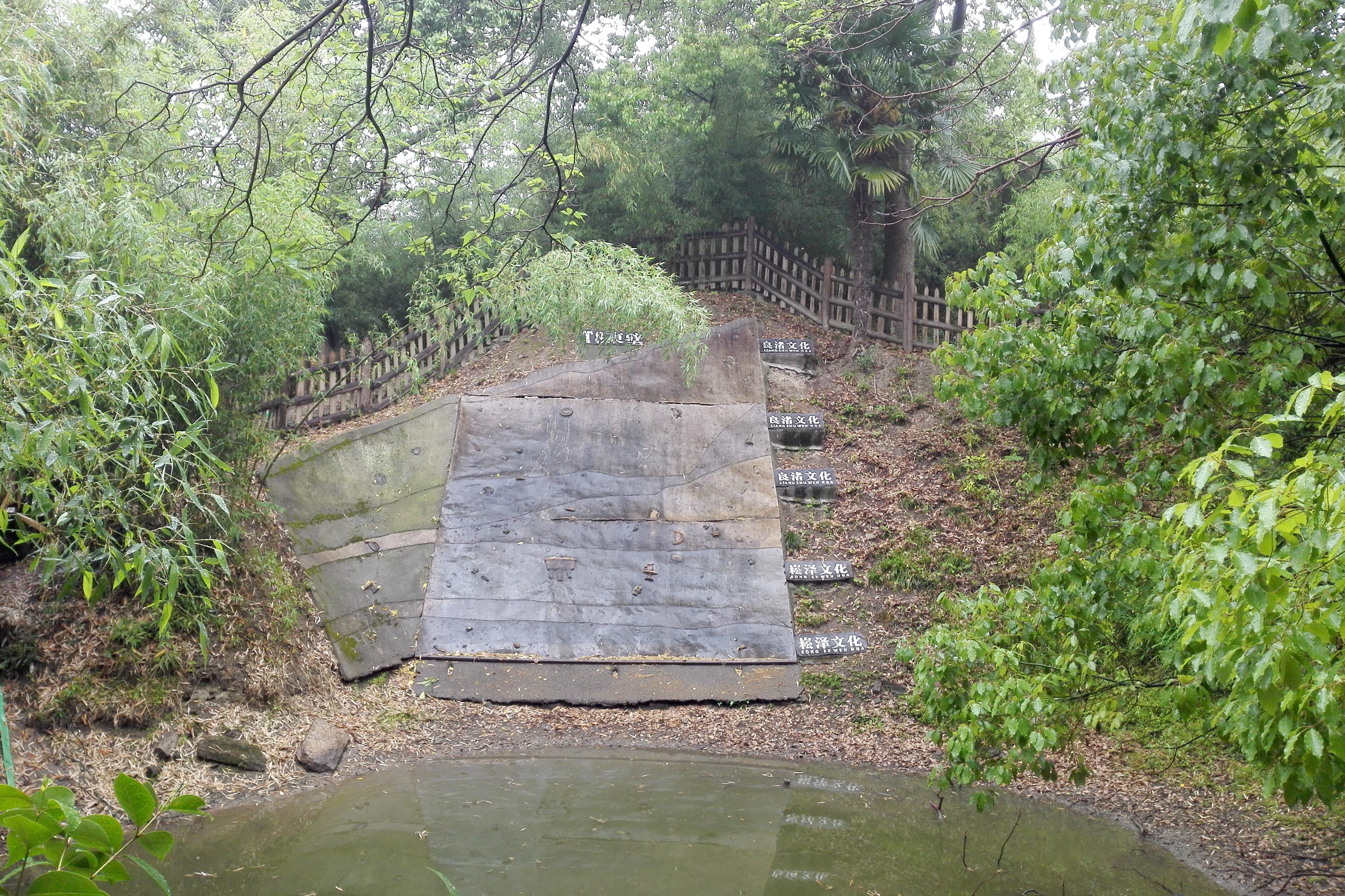 中文（中国大陆）: 上海青浦 福泉山遗址